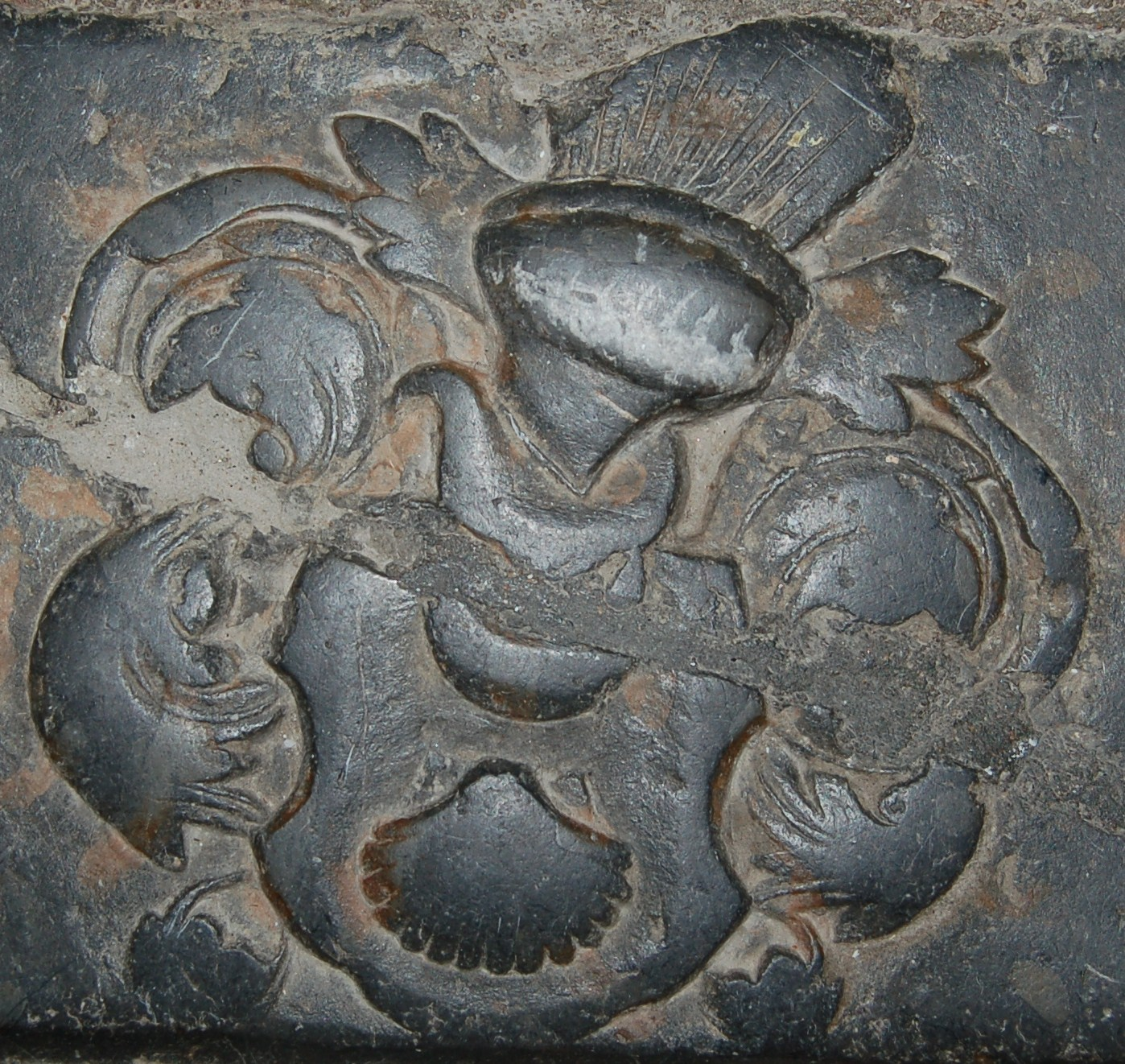 Slekten Baden - Peder Iversøn til Fresje si gravplate i Hedrum kirke